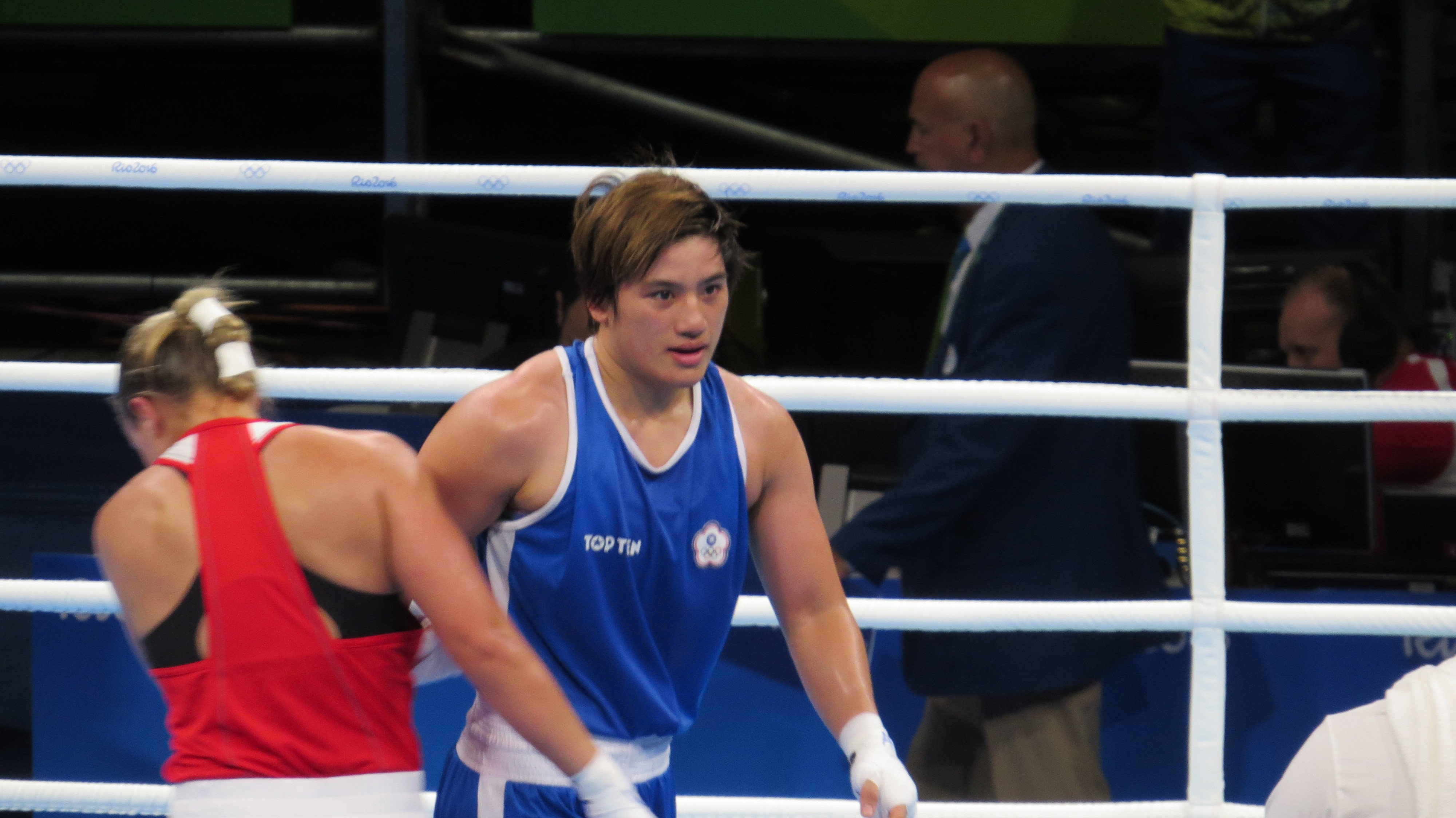 Sx50